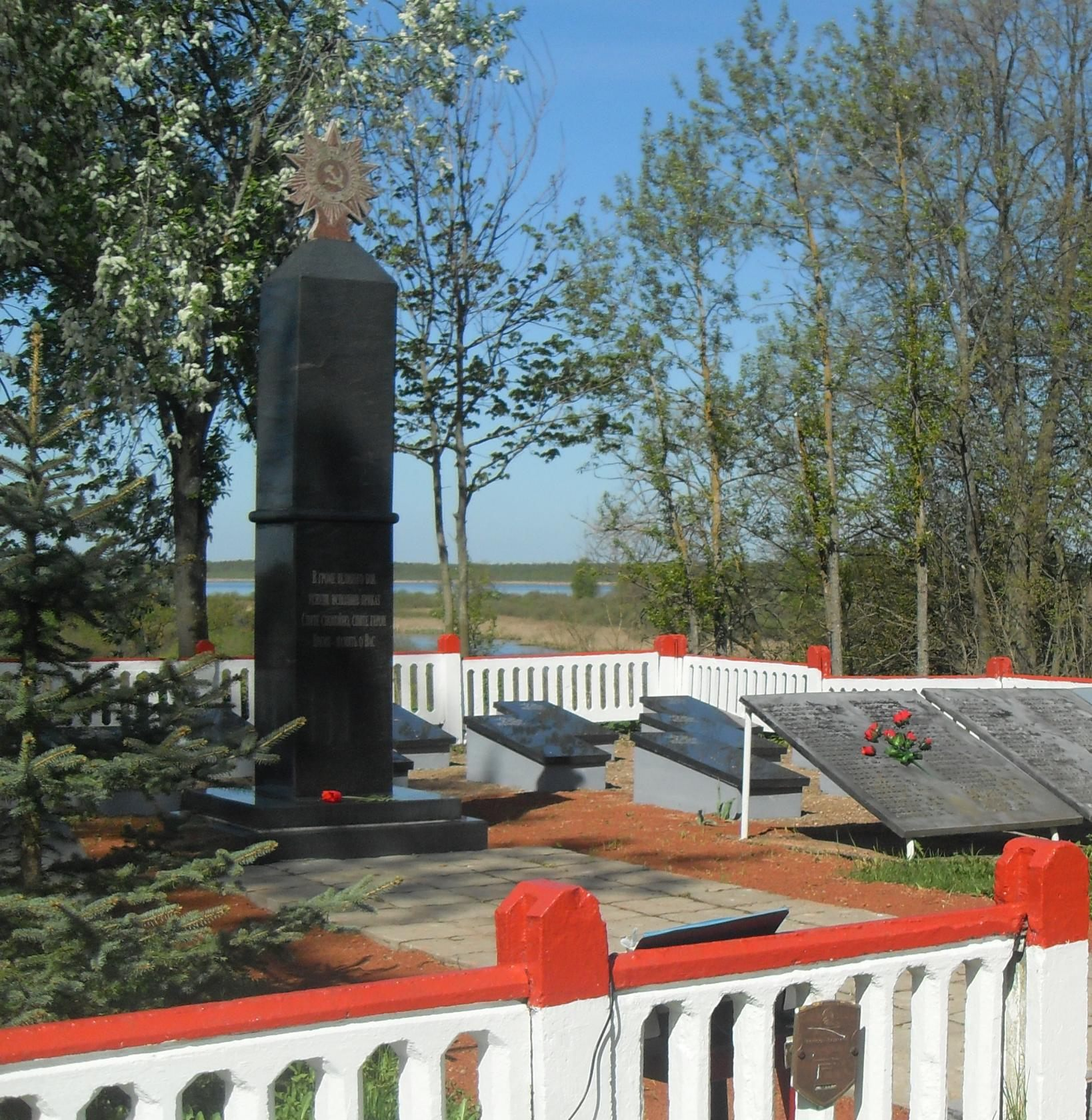 д. Добея. Братское воинское захоронение Великой Отечественной войны.